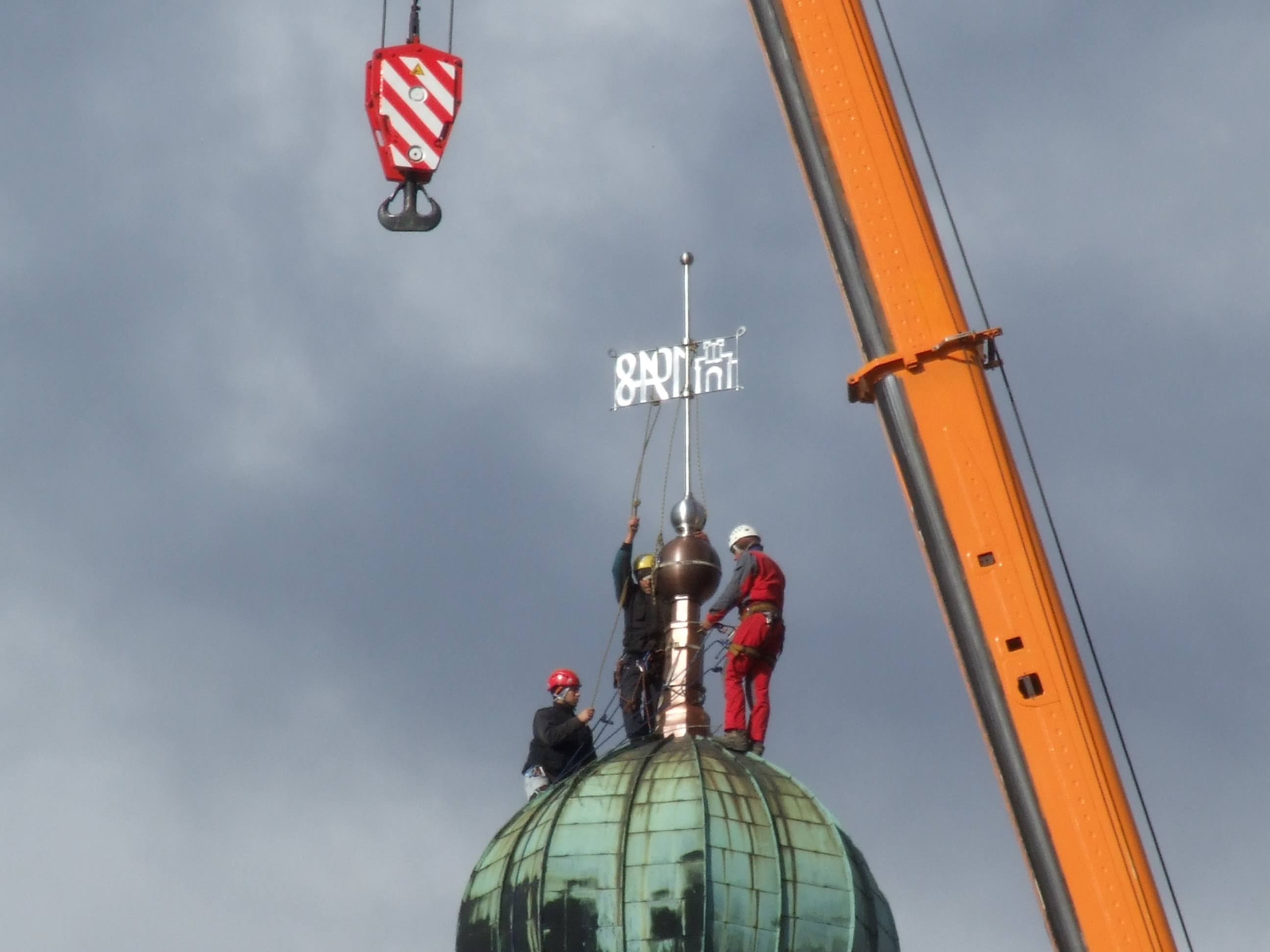 Nasazení korouhvičky na vyškovskou radnici